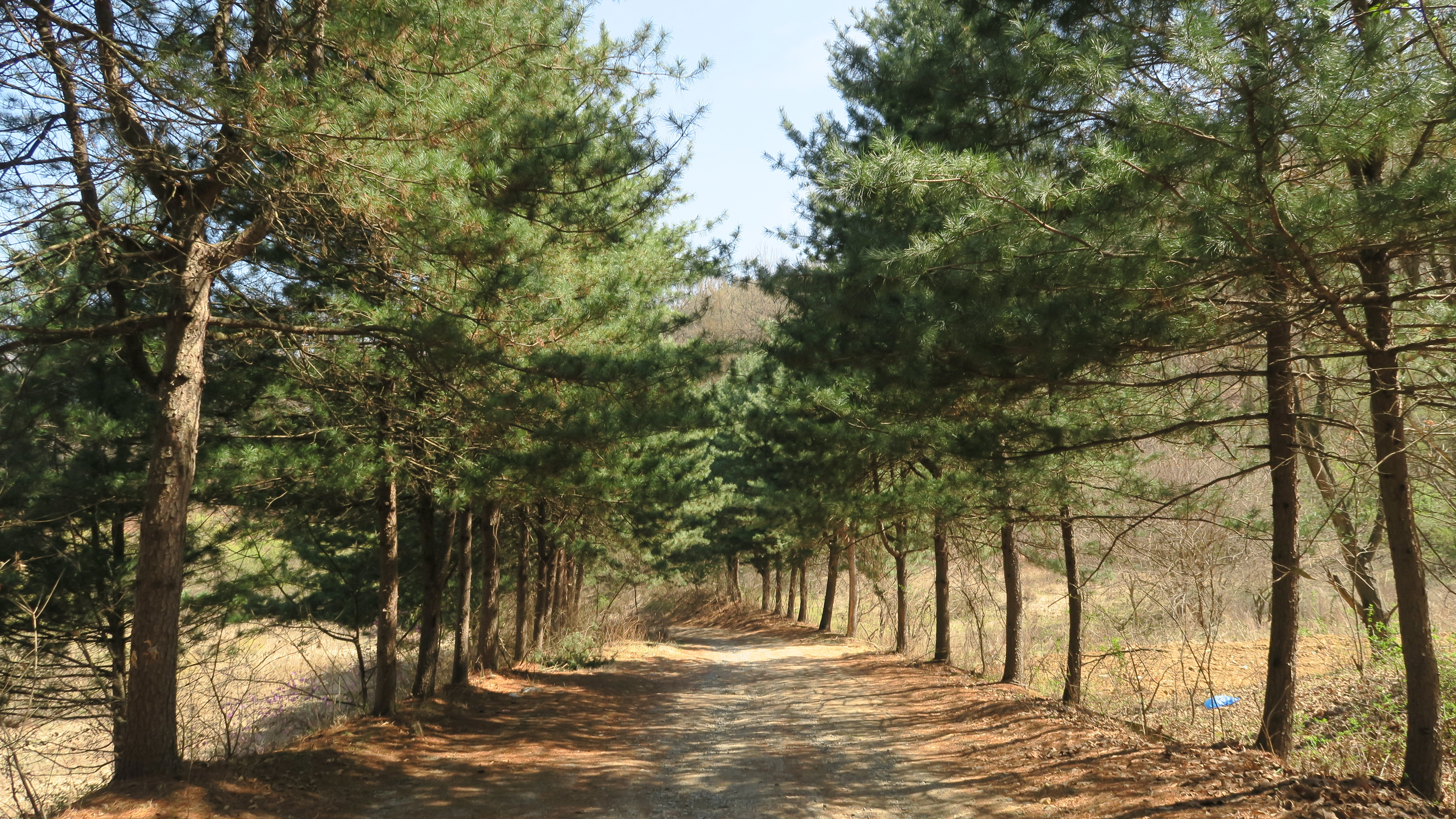 대청호오백리길 2구간_4